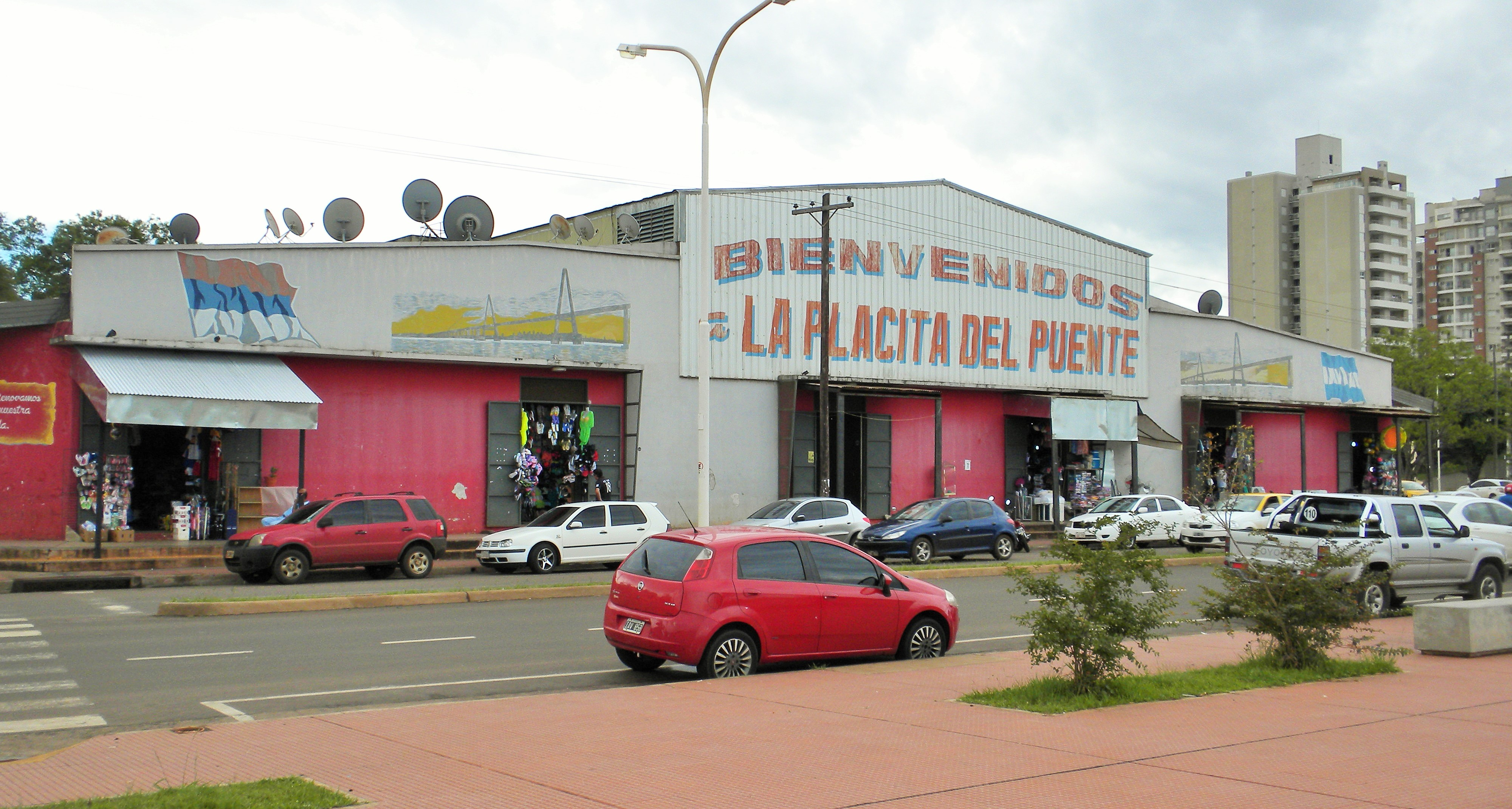 Mercado La Placita del Puente - Posadas, Provincia de Misiones, Argentina. Fuenteː Periodista Horacio Cambeiro.